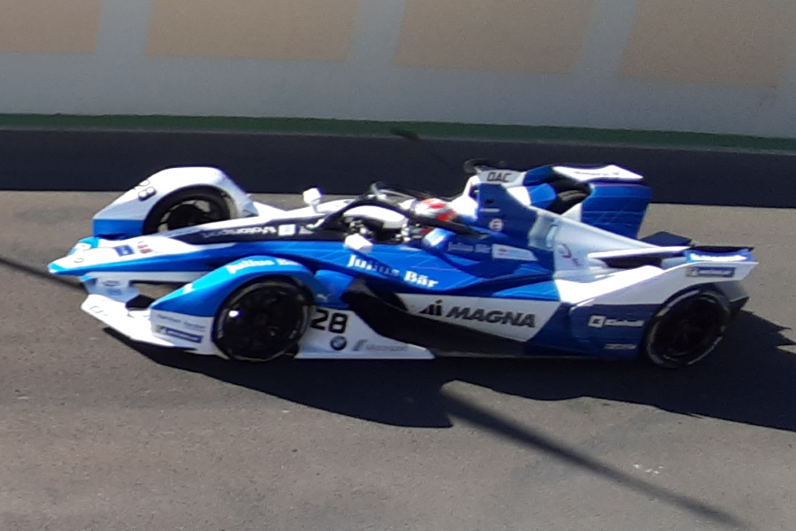 António Félix da Costa beim Marrakesch E-Prix 2019